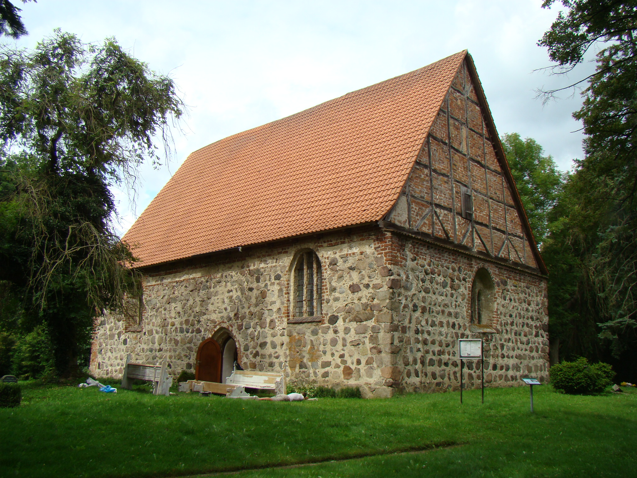 Dorfkirche in Lütgendorf (Klocksin). Foto: Peter Schmelzle, 8. August 2011.